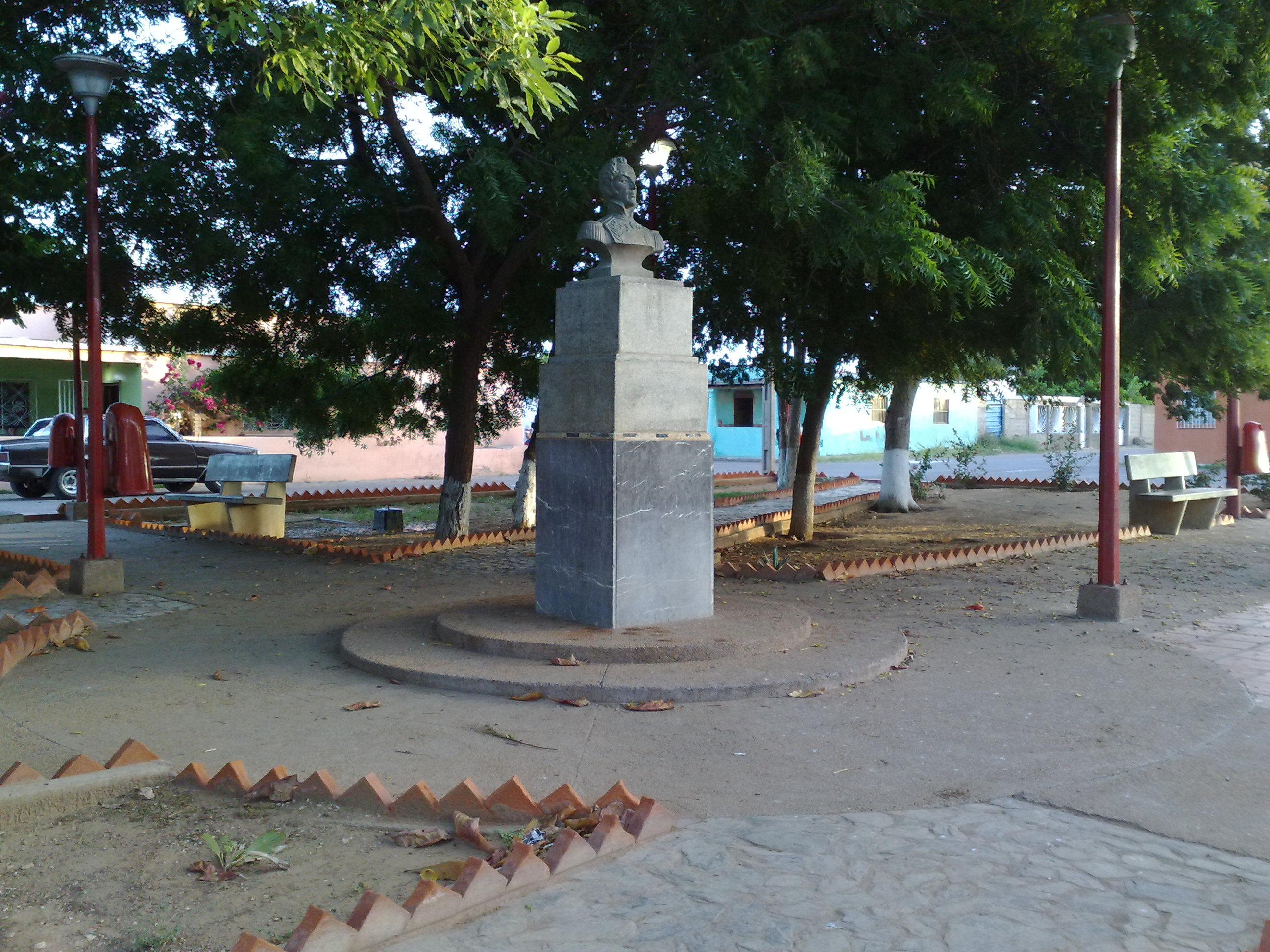 Plaza Bolívar de Tacuato.